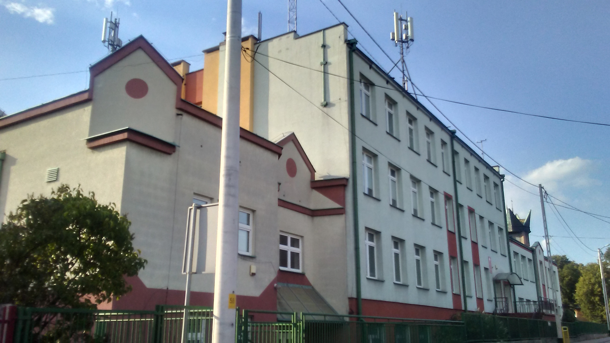 Szkoła podstawowa przy ulicy Gminnej w Tomaszowie Mazowieckim, dzielnica Białobrzegi